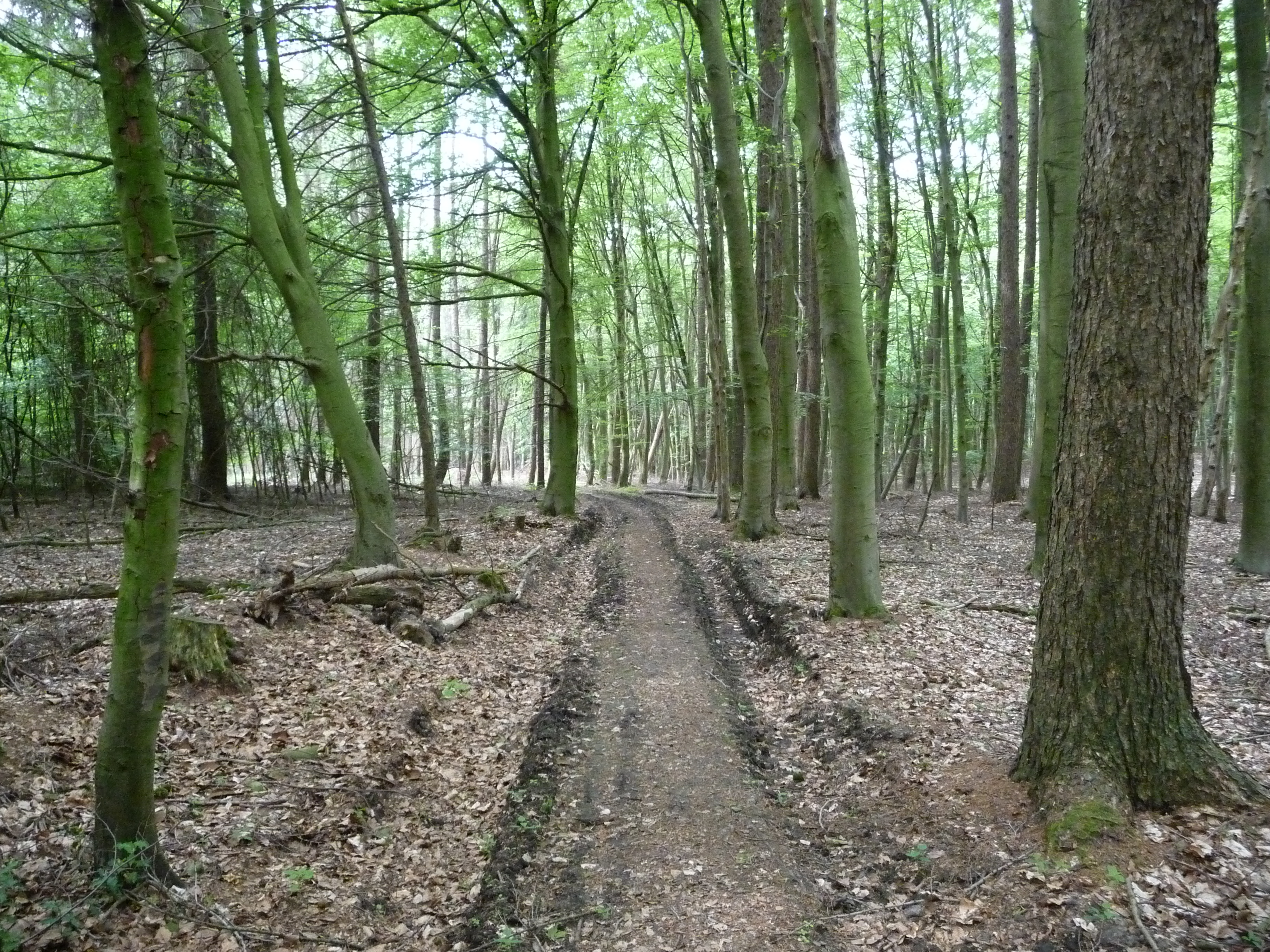 Ein fast mystisches Waldgebiet erwartet uns hier. Eine Atmosphäre wie im Dschungel, Vögel, die man noch nie gehört hat, umgestürzte Bäume. Gelegen bei Neuenkirchen.